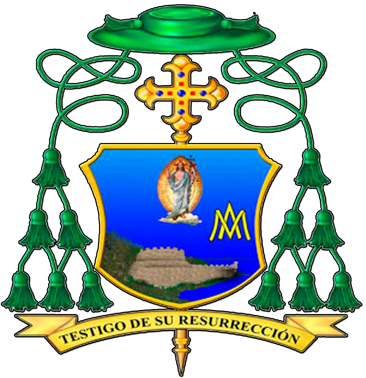 Escudo Episcopal de Monseñor Raúl Biord Castillo